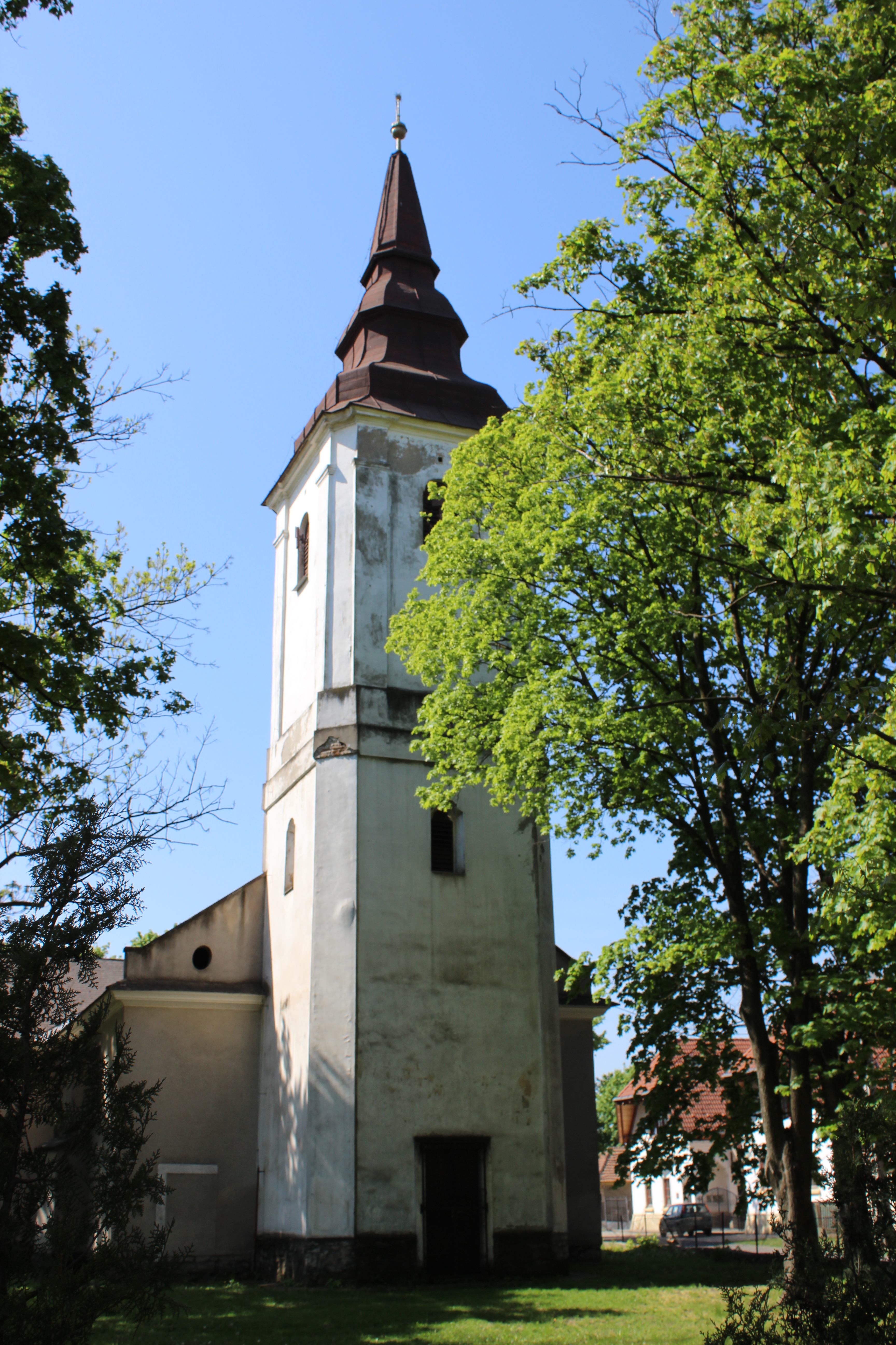 3881 Abaújszántó, Rákóczi u. 80.